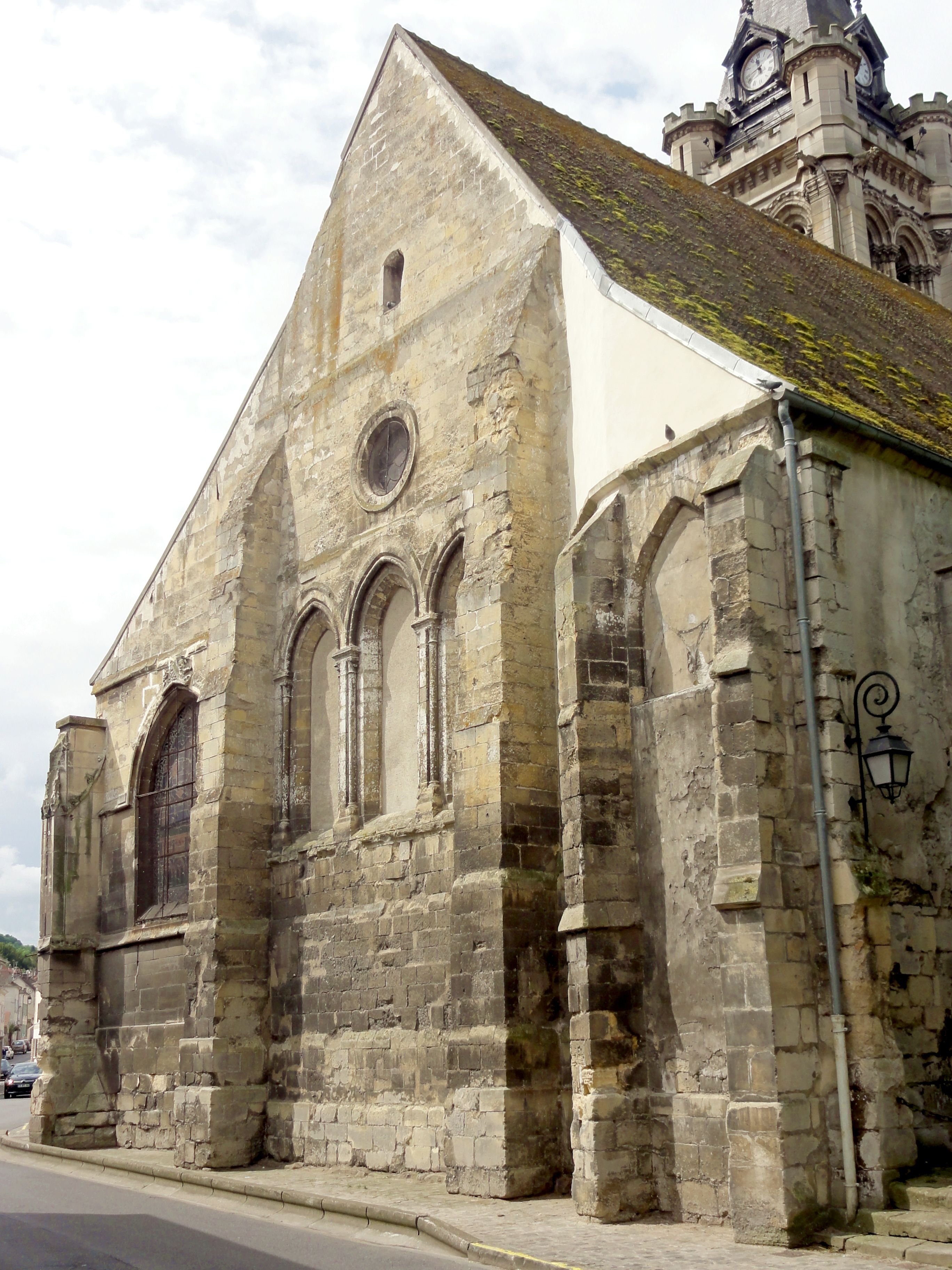 Chevet, vue depuis le nord-est.